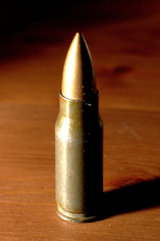 Inert 7.92 Kurz round